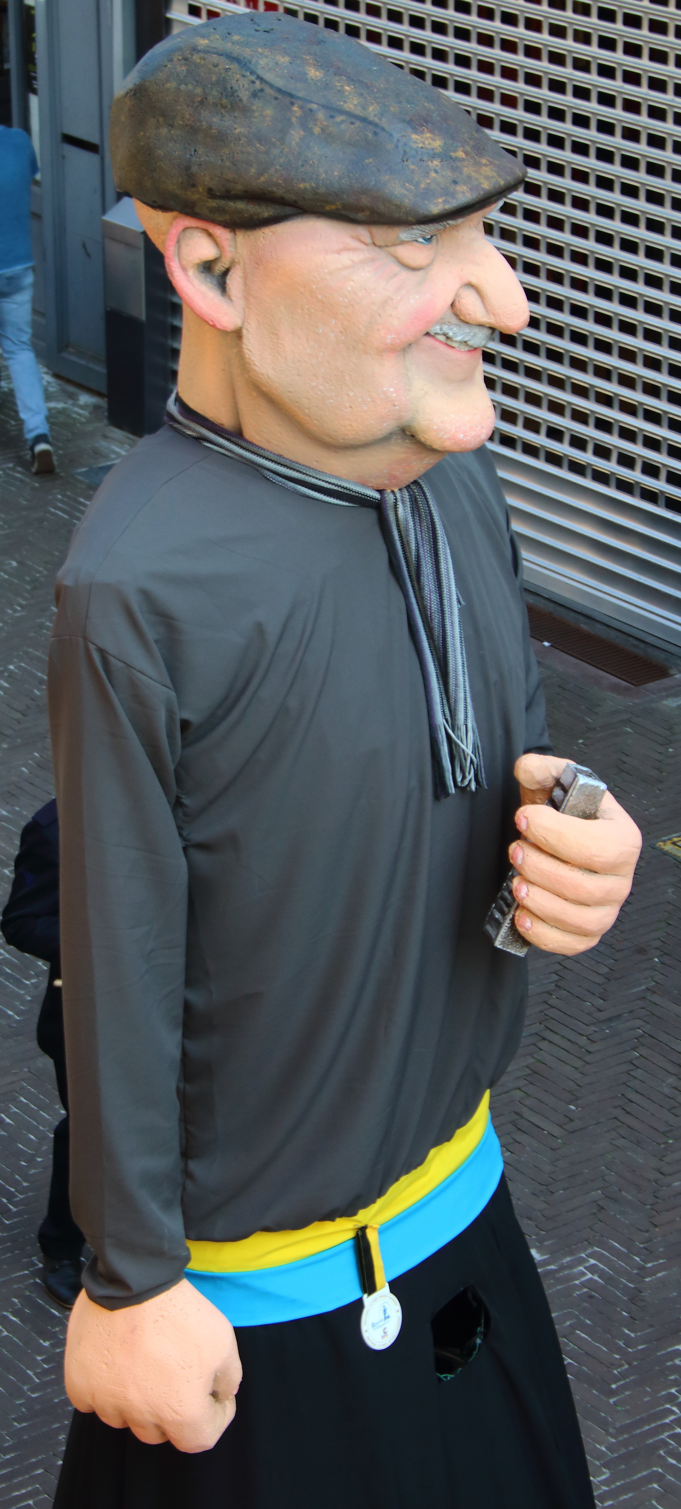 reus 'Miele', Zottegem, Vlaanderen, België